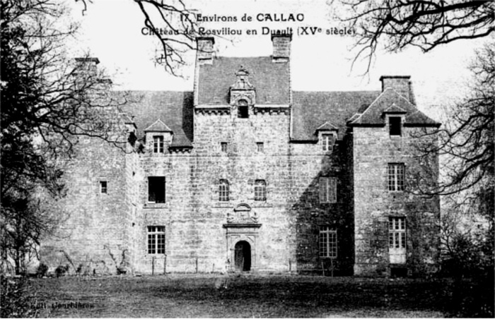 Ville de Duault (Bretagne) : manoir de Rozvilliou.